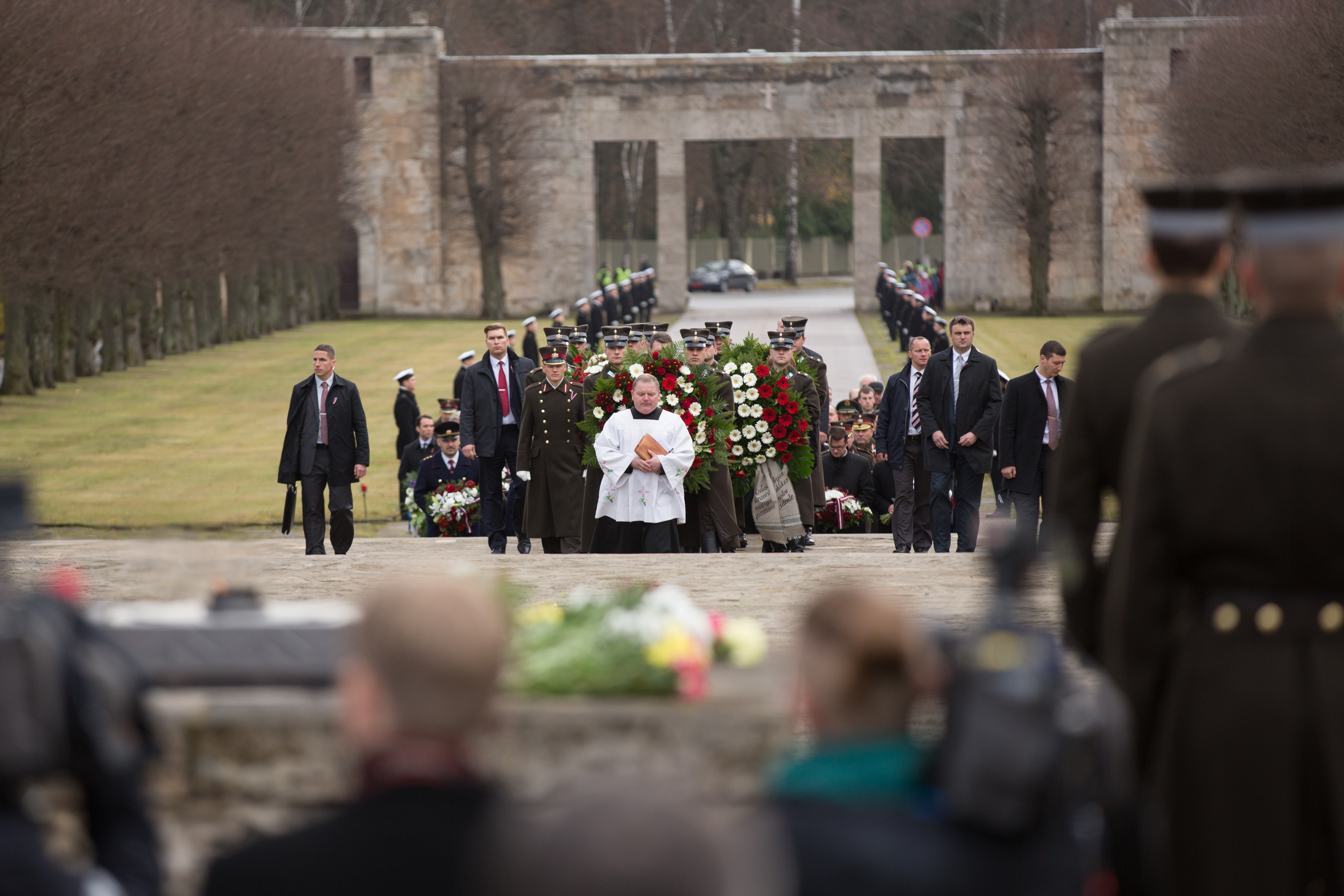 2015.gada 11.novembris. Lāčplēša dienai veltītā vainagu nolikšanas ceremonija Rīgas Brāļu kapos. Foto: Ernests Dinka, Saeimas Administrācija Izmantošanas noteikumi: saeima.lv/lv/autortiesibas